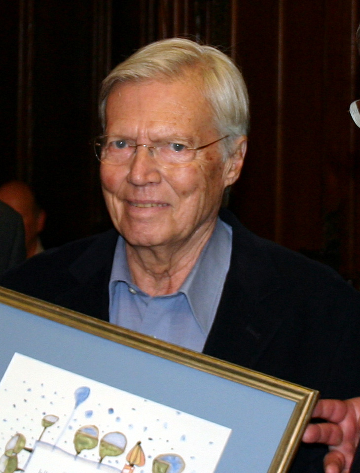 Der Schauspieler und Initiator der Stiftung "Menschen für Menschen" Karlheinz Böhm im Januar 2008 in München. (Verleihung des internationalen Hundertwasser-Preises 2008.)